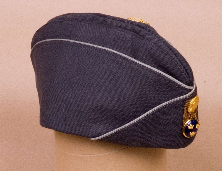 Båtmössa m/1960 för generalsperson Identifikationsnr: AM.019922 Samling: Armémuseum